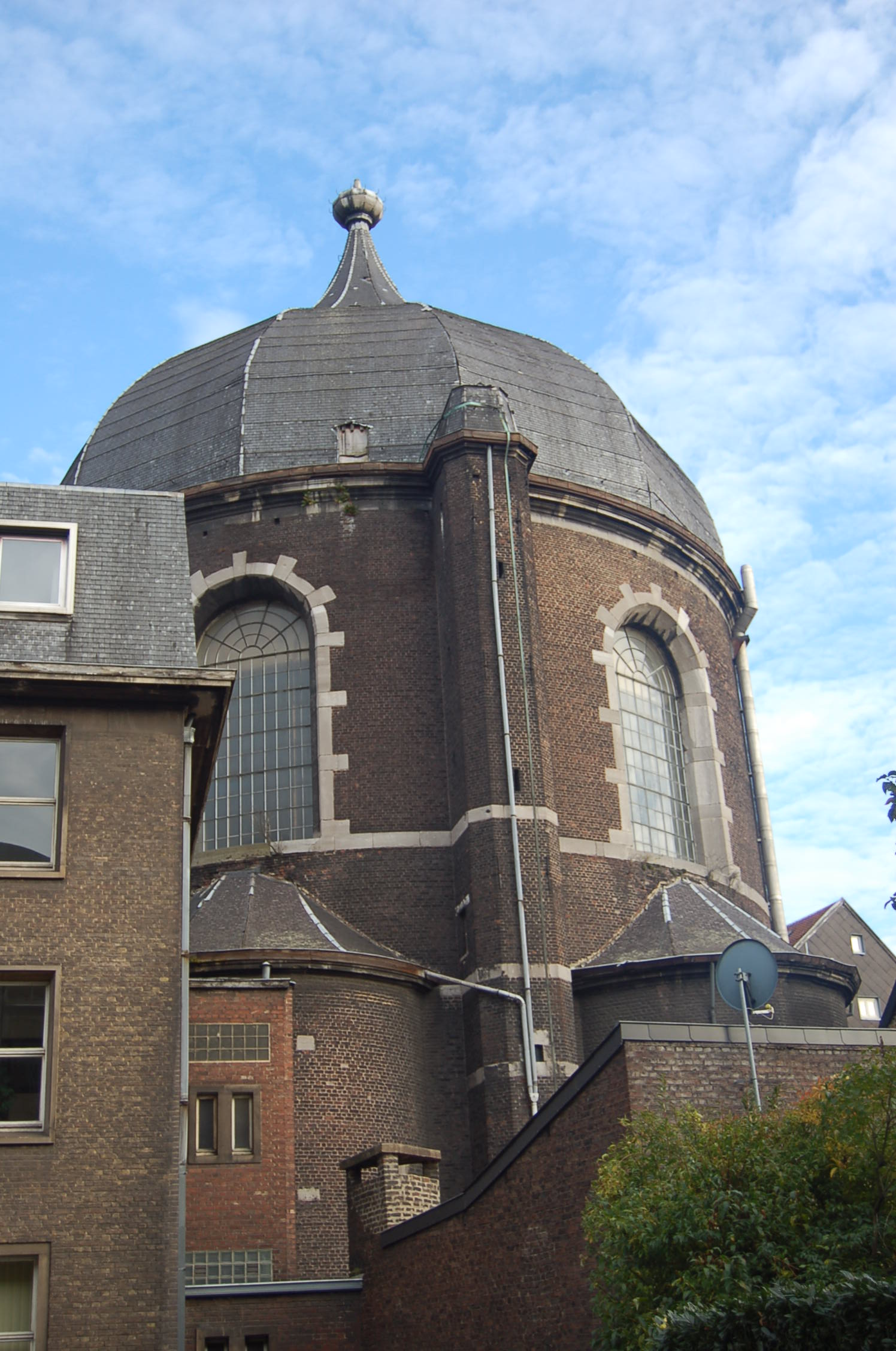 Église Saint-André (Liège, Belgique)